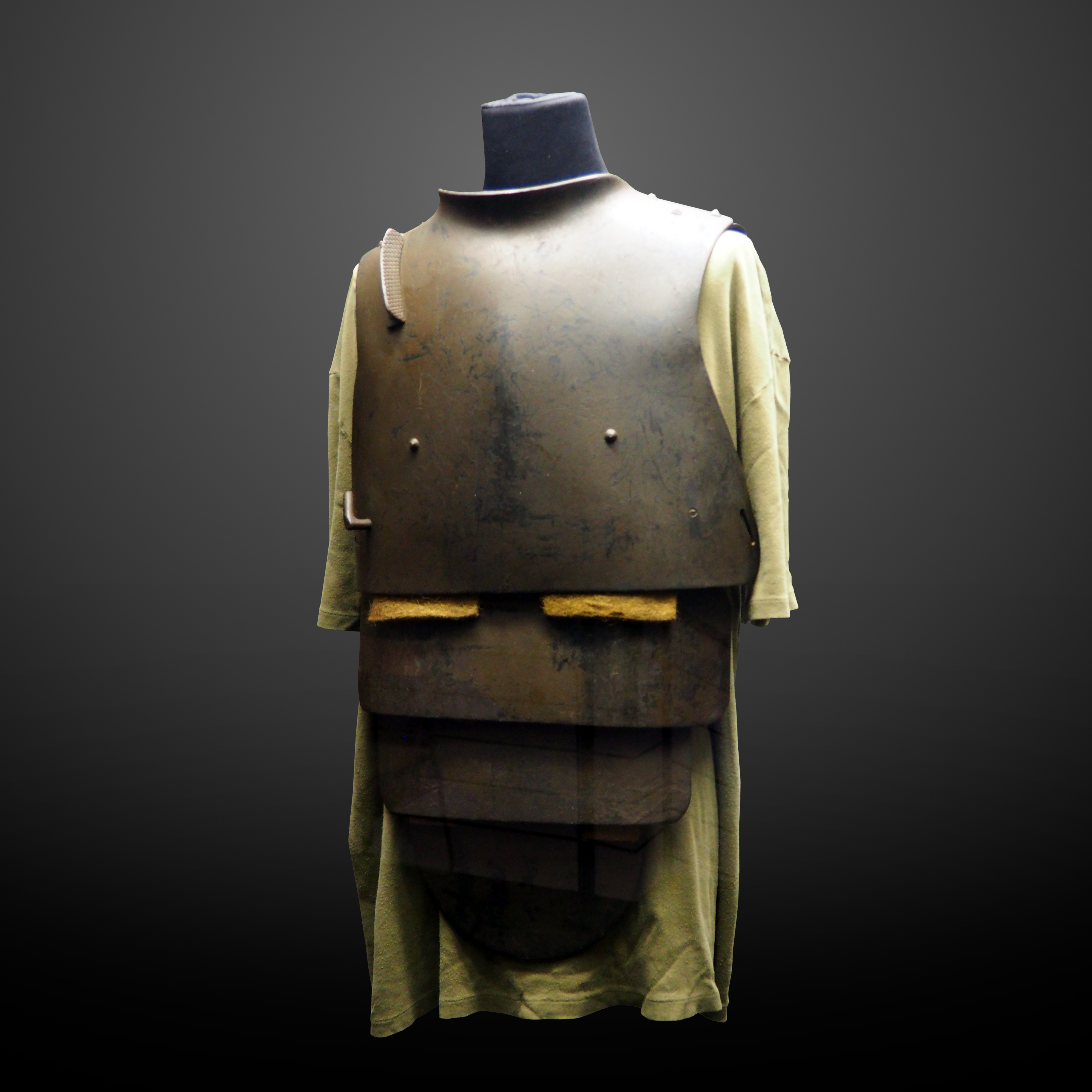 Sappenpanzer armour M1917, Krupp, Germany circa 1917, Musée de Morges Inv. 1010791